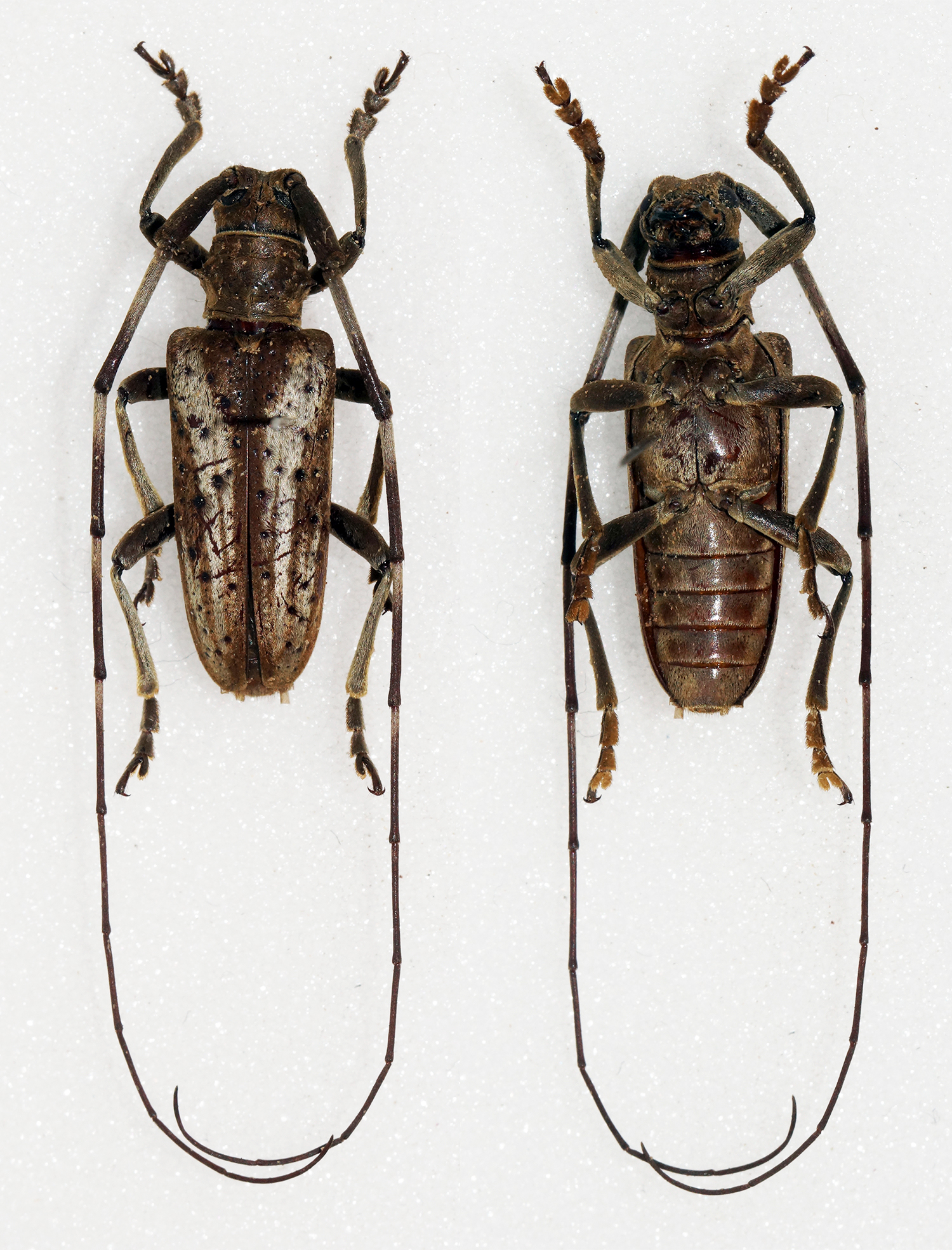 Gahan,1888 Sex: Male Data: 06-2010 - Mt Dayingshan - Yunnan Prov - China Size: 19.5mm